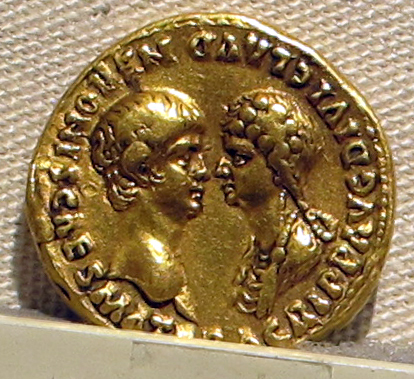 Palazzo Massimo alle Terme